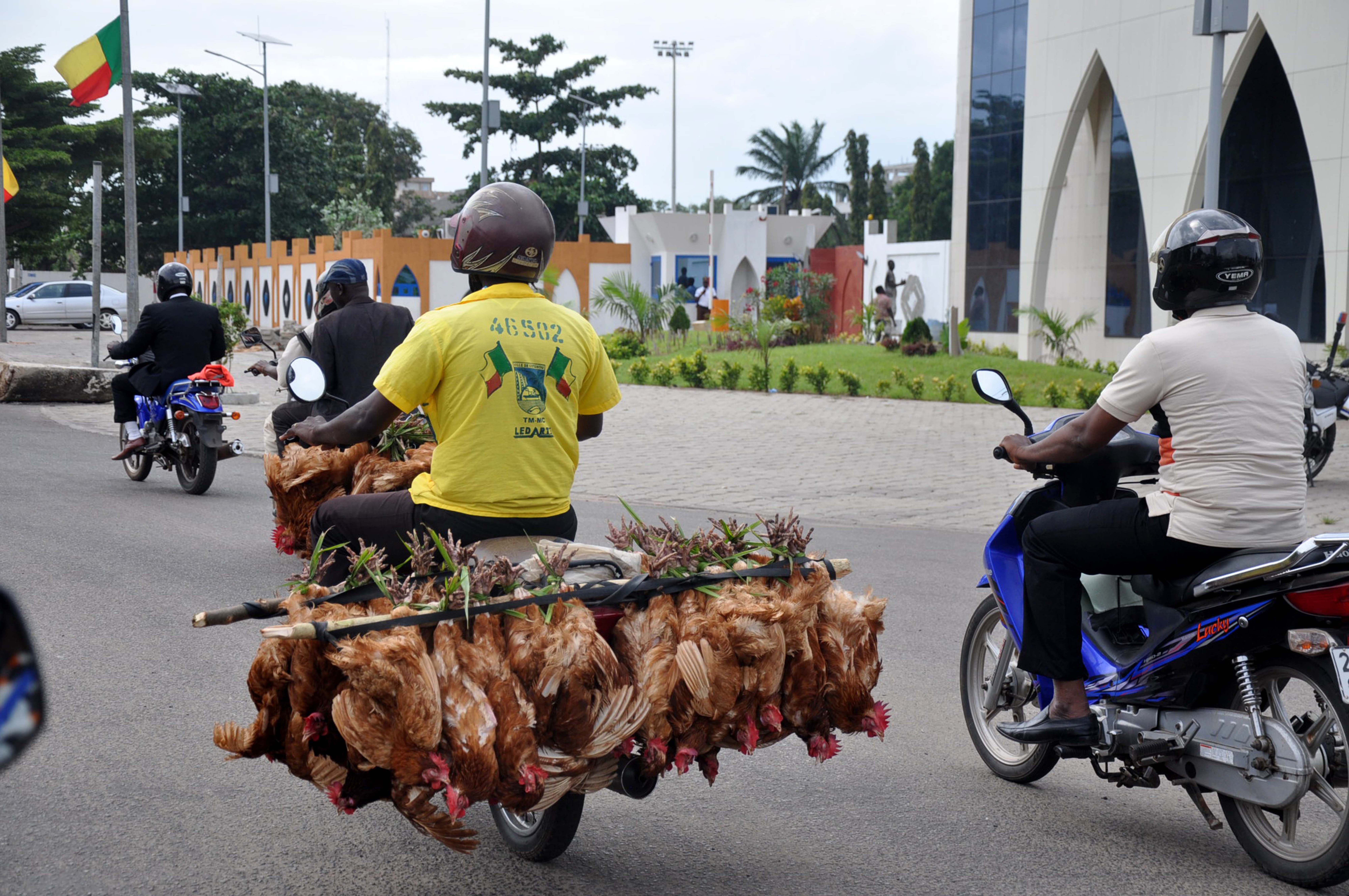 this zemidjan sells the chickens for the new year celebrations and at the same time takes the passengers too This is an image with the theme "Africa on the Move or Transport" from: Benin